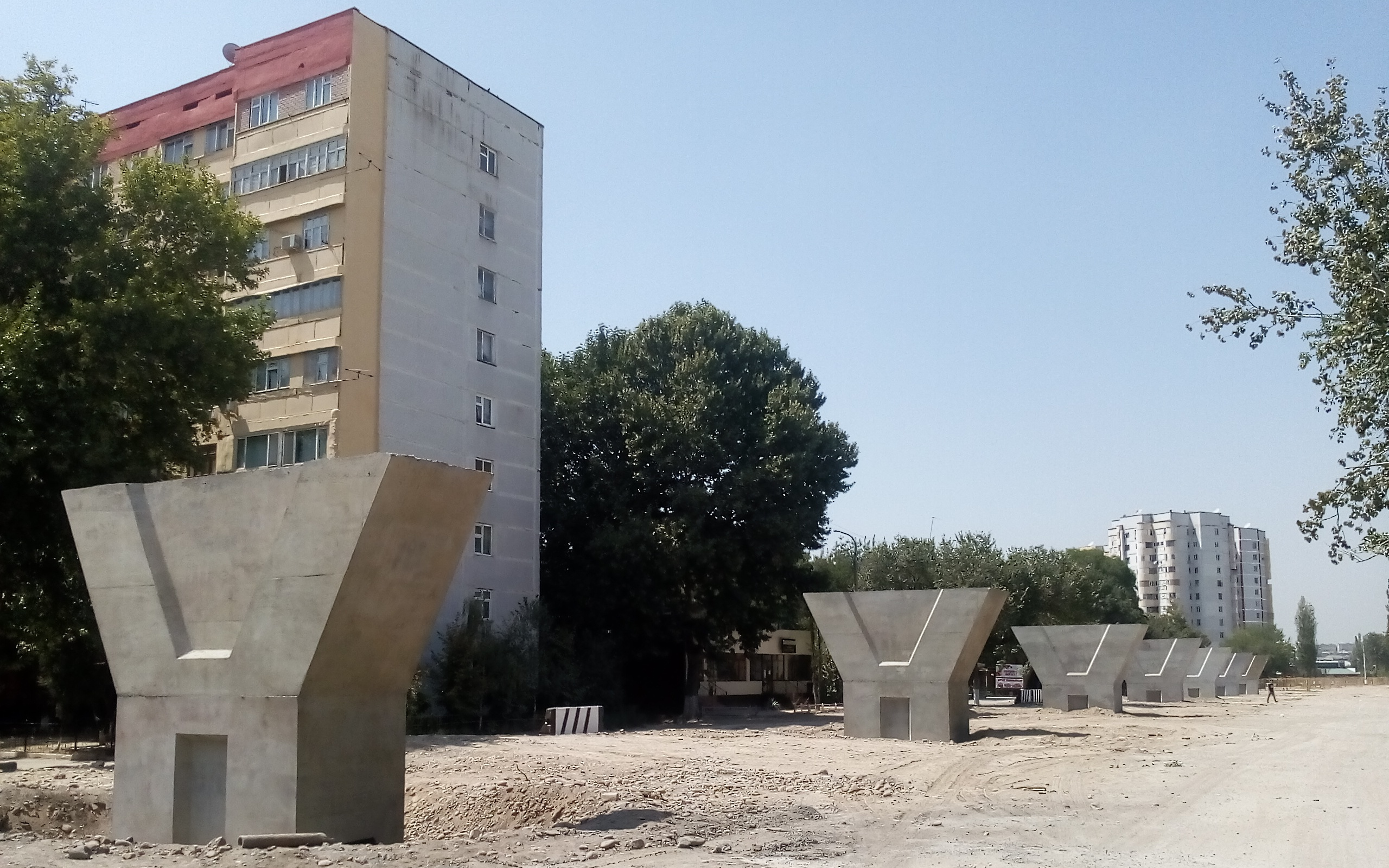 Строительство Кольцевой лини Ташкентского метрополитена (Ахангаранское шоссе)